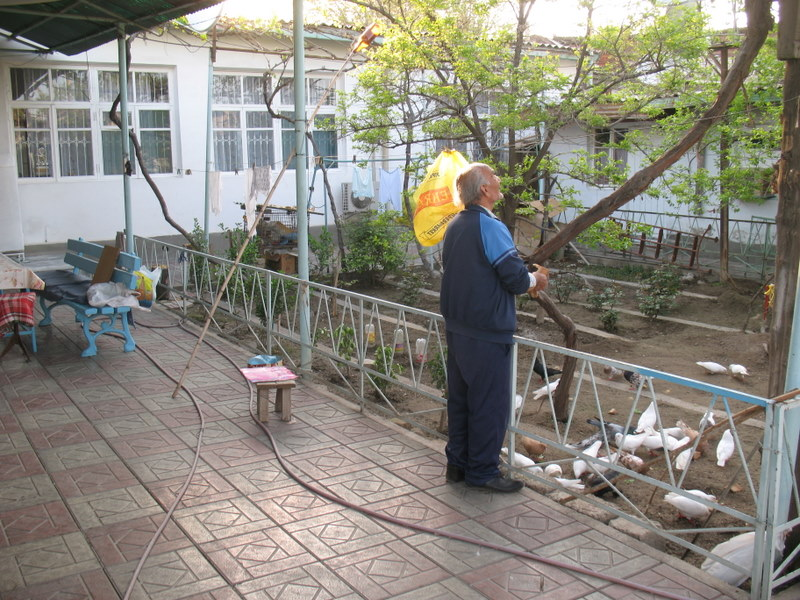 In de tuin van homestay Amanov